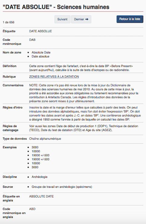 Fiche descriptive de la zone "Nom de l'objet" des Dictionnaire de données du RCIP